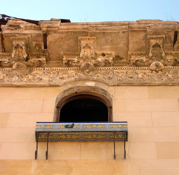 Arquitectura